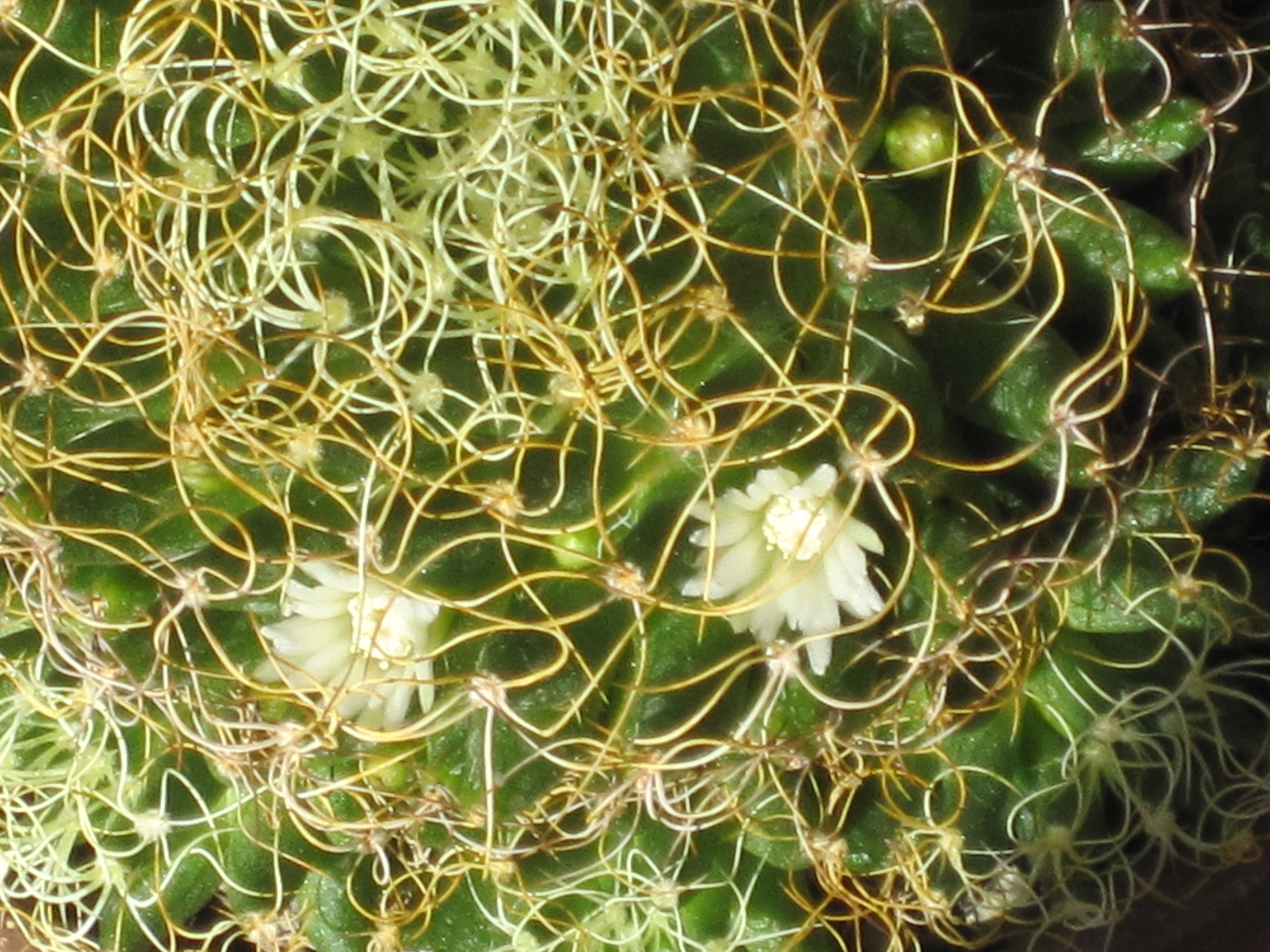 I fiori della mammillaria camptotricha var. crispata